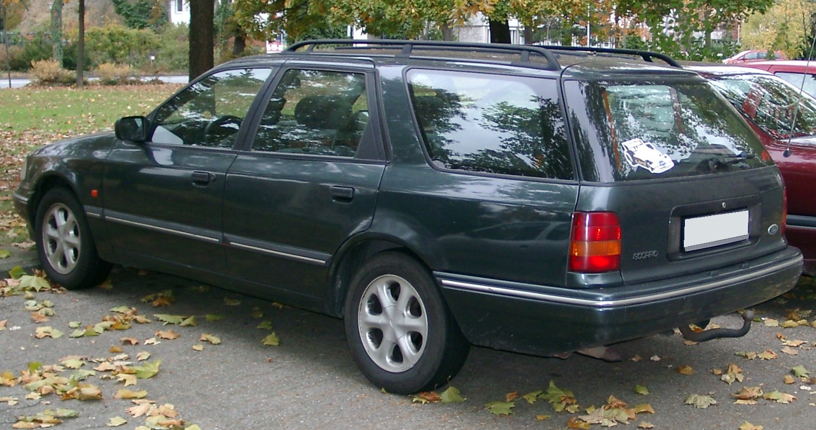 Ford Scorpio Turnier, 1. Generation